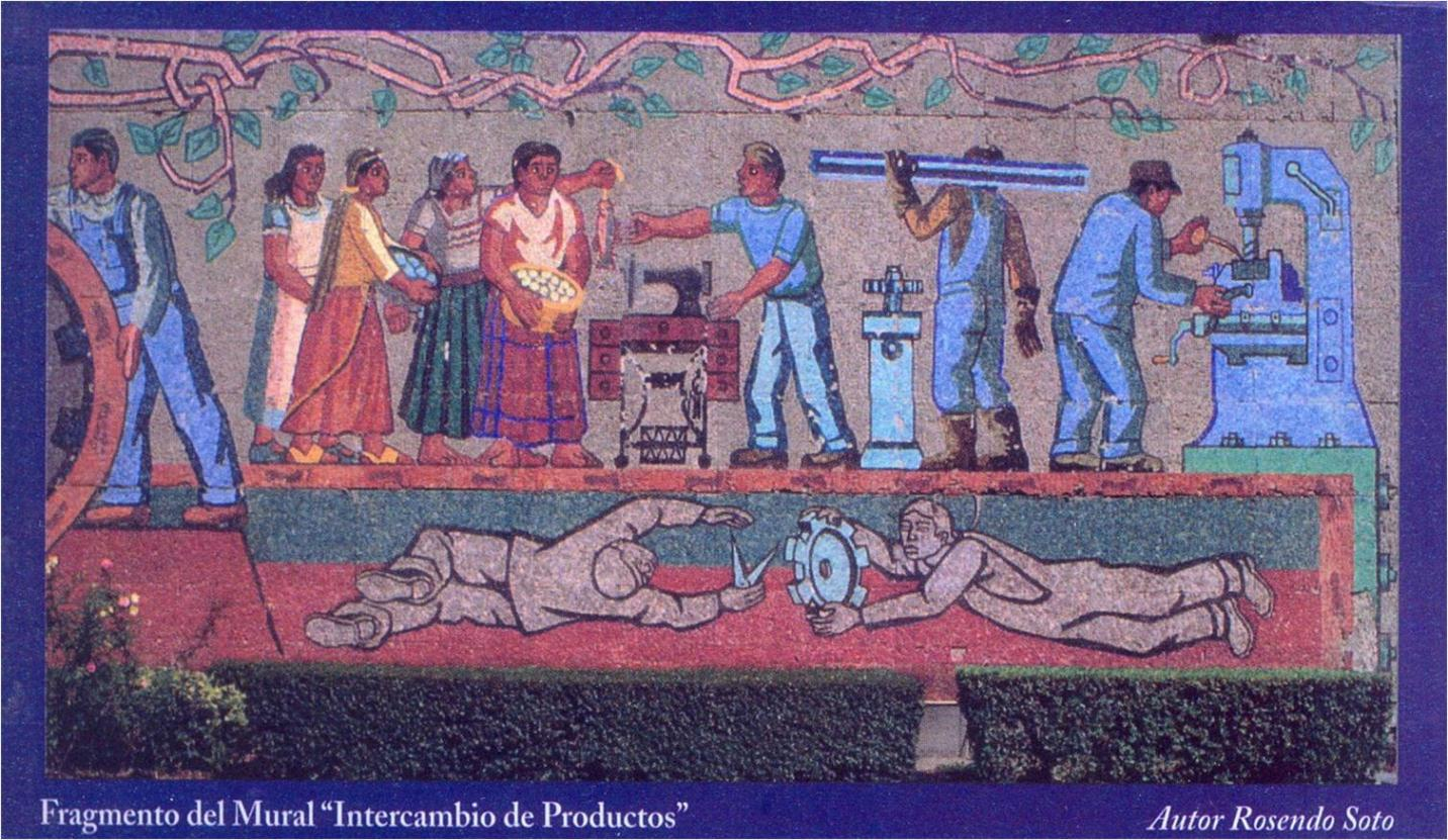 mural en la secretaria de comunnicaciones, scop